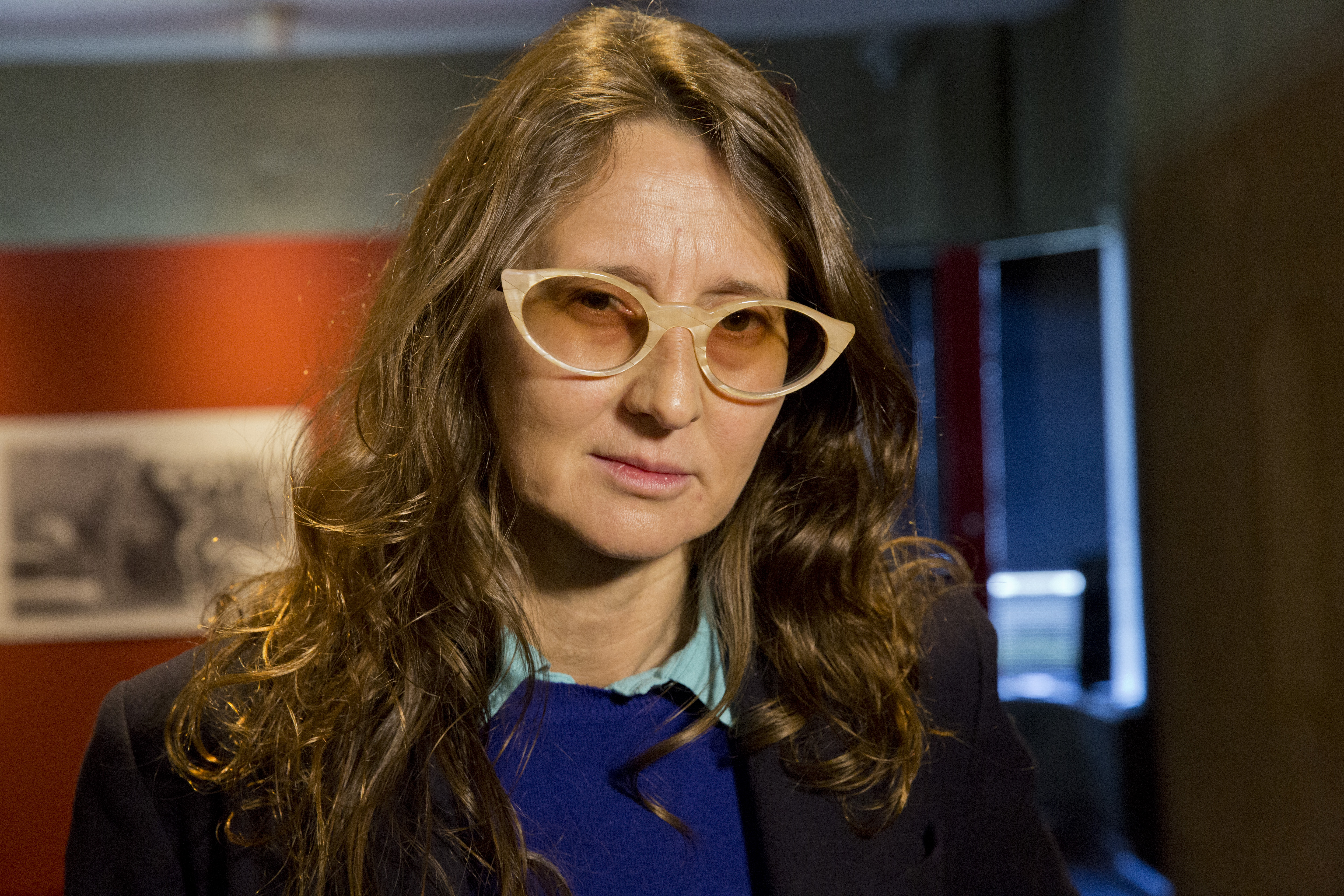 La Ministra de Cultura de la Nación, Teresa Parodi, presentó esta mañana, en el Auditorio J. L. Borges de la Biblioteca Nacional, la plataforma “Audioteca”, la primera colección de treinta cuentos de autores argentinos grabados por actores que será de carácter federal, público y gratuito. Participaron también de la presentación el secretario de Gestión Cultural, Jorge Espiñeira, la coordinadora de “Audicoteca”, Lucrecia Martel, y la curadora de la colección de cuentos, Graciela Esperanza. Fotos : Margarita Solé / Ministerio de Cultura de la Nación